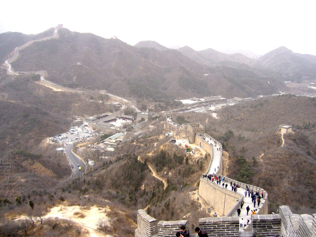 中華人民共和国、北京市にある万里の長城のうち、最も一般的な観光ポイントである「八達嶺長城」の様子。一般的には登り口にある道路等は写っていない写真がガイドブックやホームページ等に掲載されることが多いが、実際の雰囲気はこの写真のほうがわかりやすいかもしれない。四角い広場状になっているかつての関所の部分に入場口やチケット売り場がある。右の方に伸びる道路の先にバスターミナルがあり、ホテルやみやげ物店が連なっている。向こう側がいわゆる「男坂」でこちらが「女坂」だが、中国ではそのような呼称はない。2006年3月27日に投稿者が撮影。黄砂の日で遠方は霞んでいる。